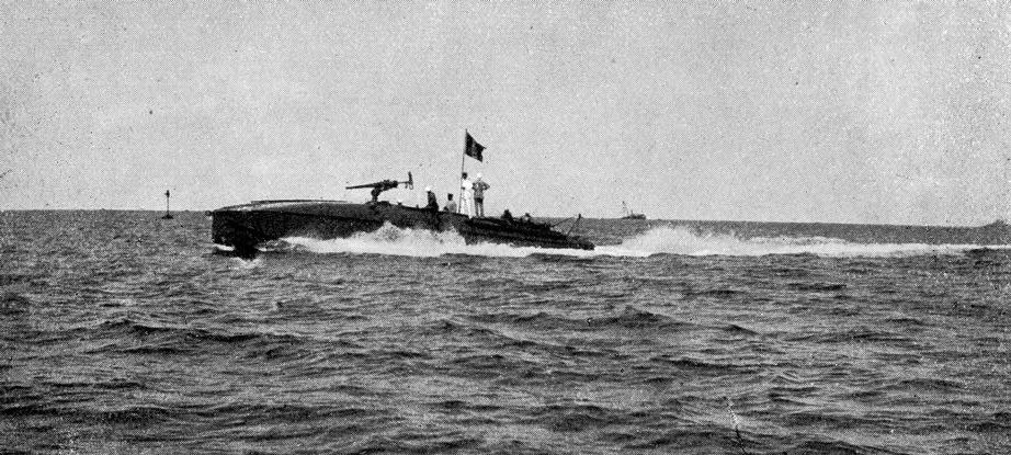 Motoscafo armato della regia marina nella prima guerra mondiale. Tratto da: La Lettura rivista mensile del Corriere della Sera del 1 gennaio 1917; Titolo dell'articolo: La caccia ai sommergibili; pag.61 Descrizione originaria: Motoscafi pel dragaggio delle mine